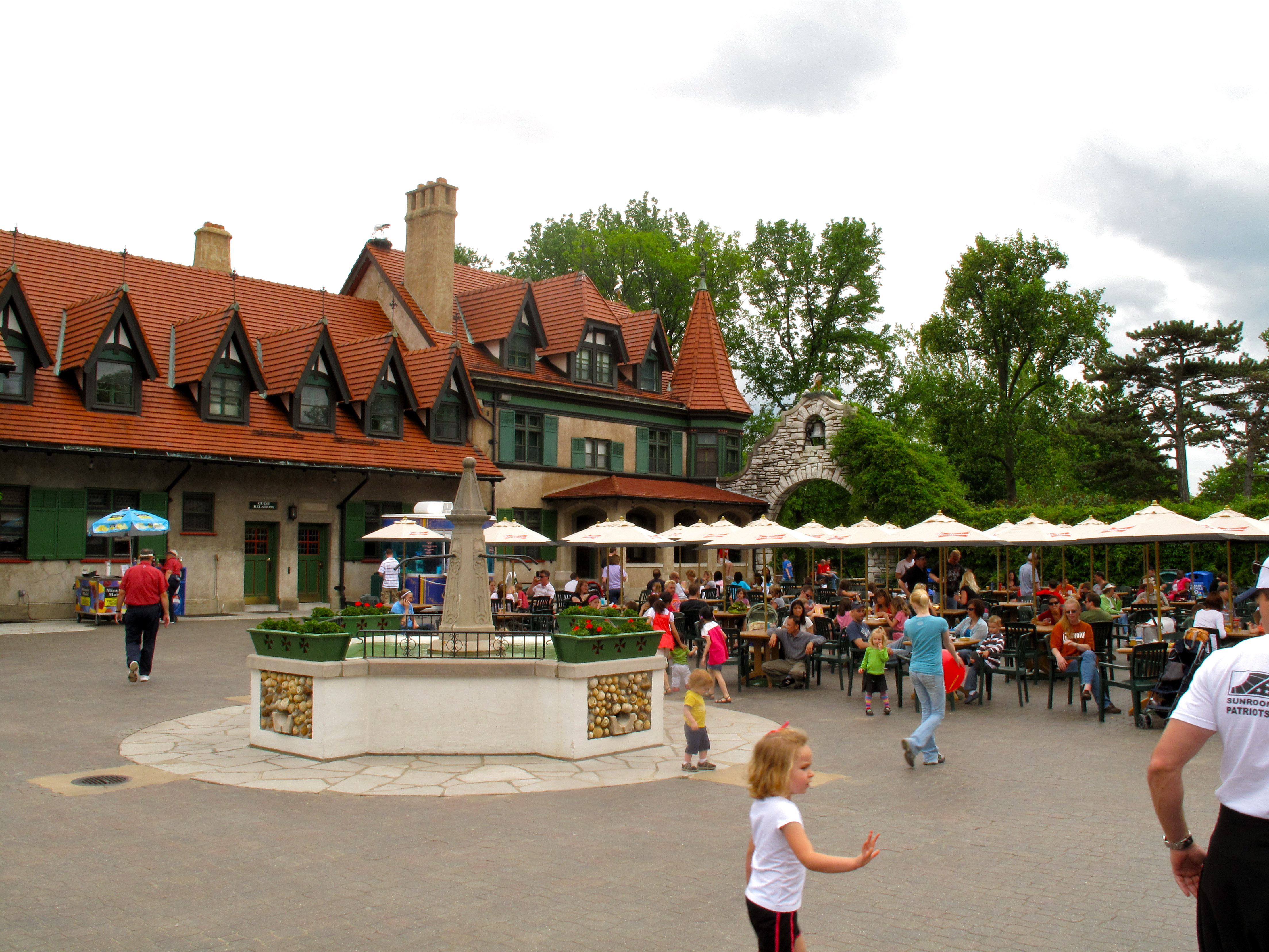 beer garden 1